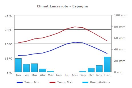 Climat Lanzarote - Espagne